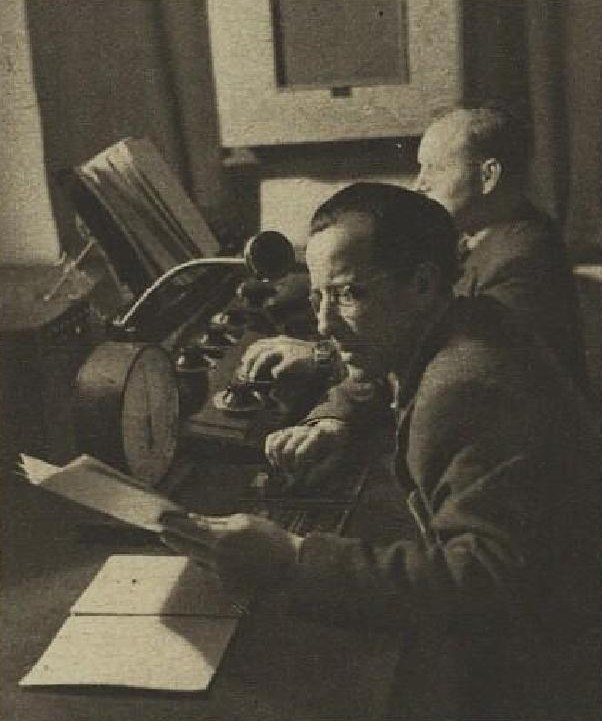 Oldřich Hoblík (1913-1981), český rozhlasový režisér a herec